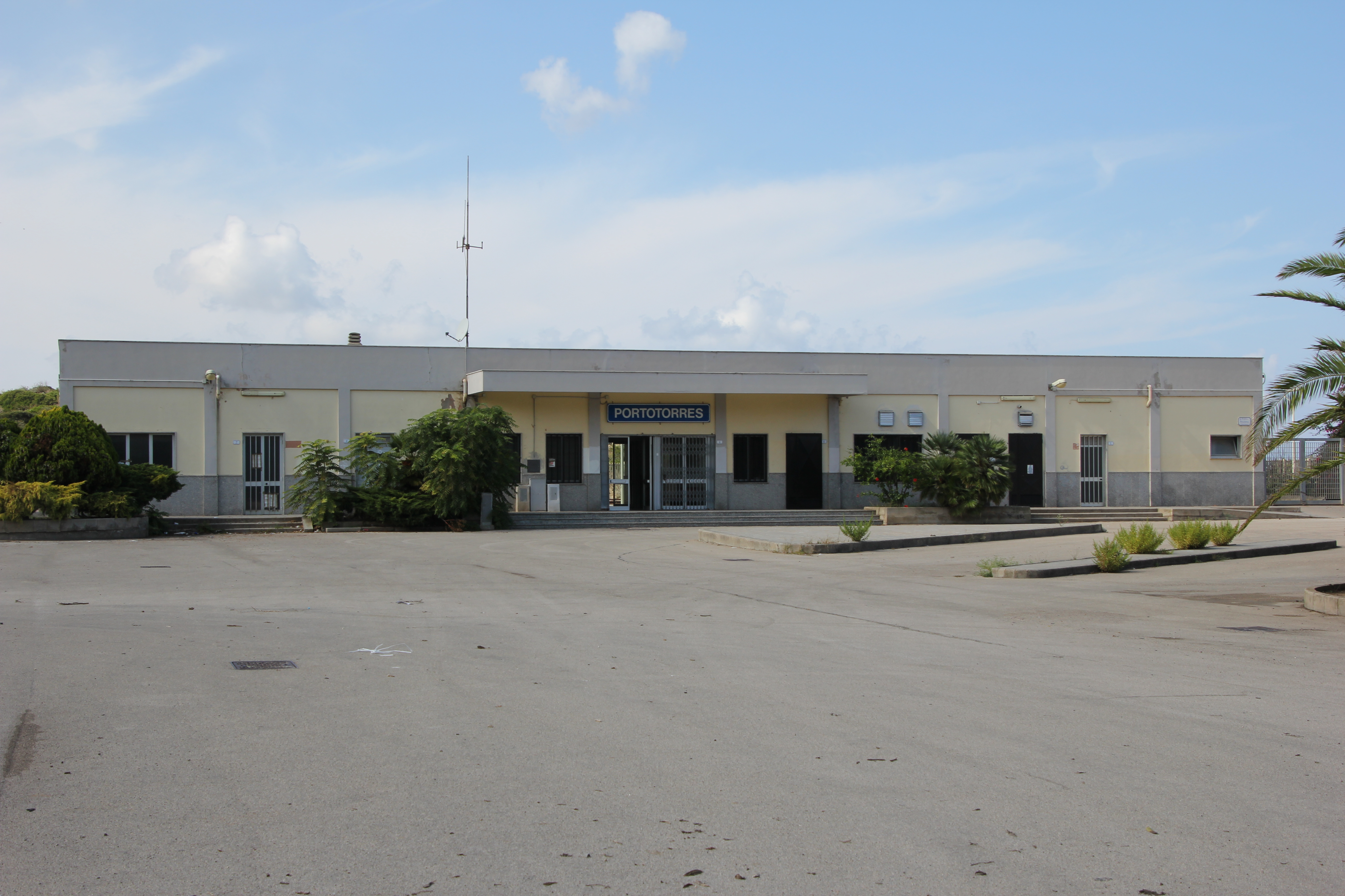 Porto Torres, stazione ferroviaria